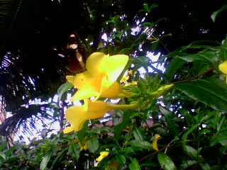 butterfly